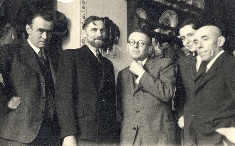 K. Čížek, V. Fiala, T. F. Šimon, S. Čížek, J. Čížek